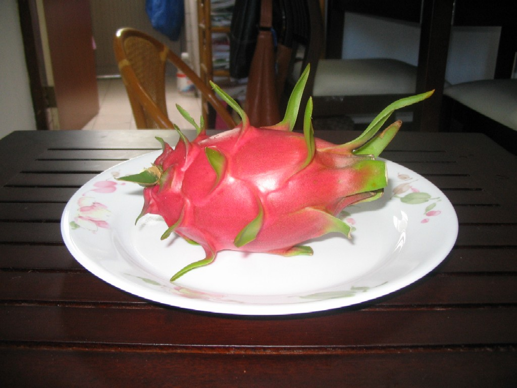 Pitaya